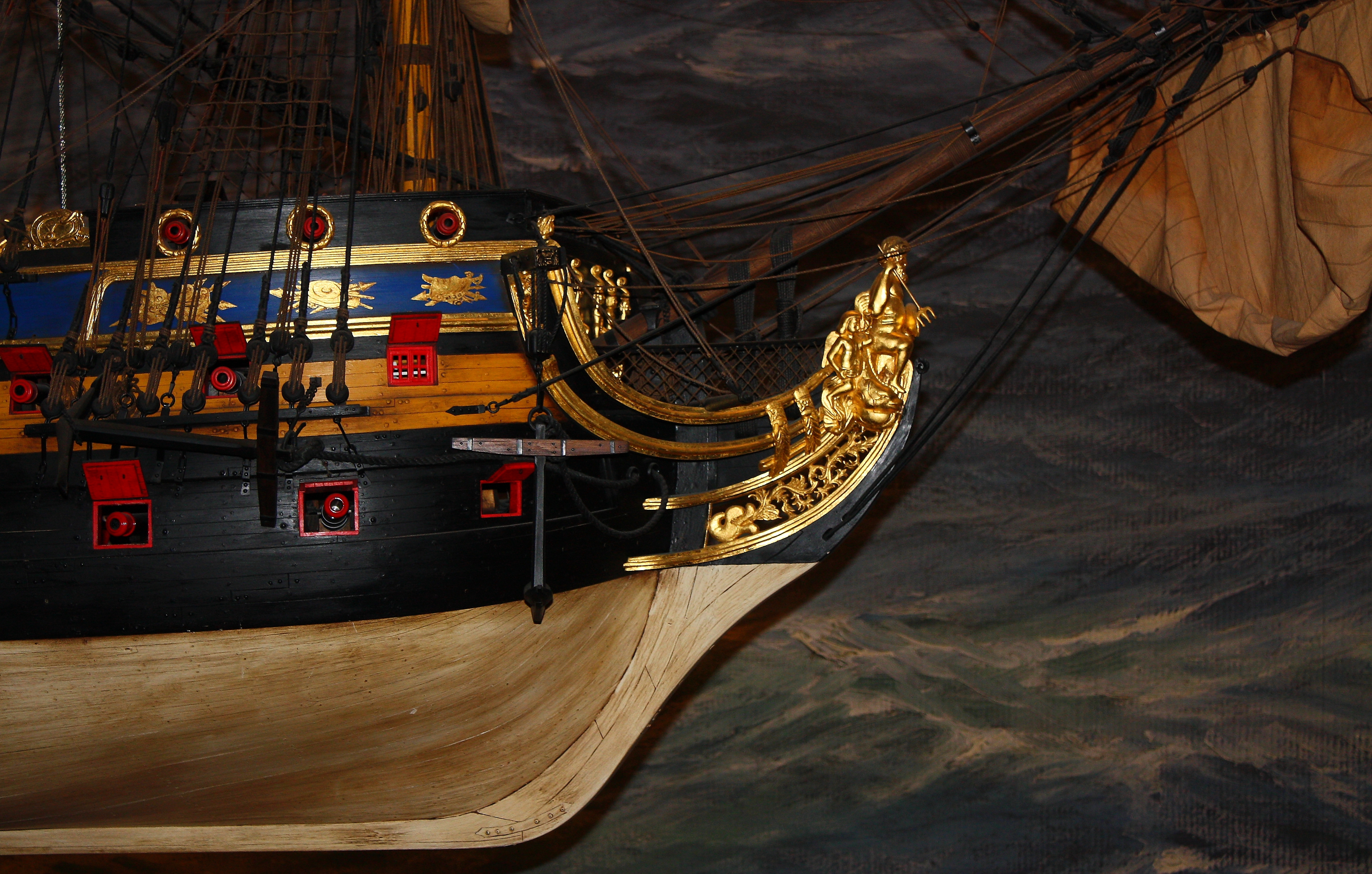 Steuerbord Bugansicht der Wapen von Hamburg (III)